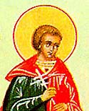 Święty Apphianos, Saint Aphian